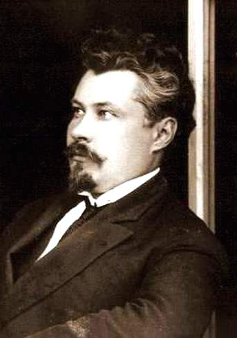 Русский социалист-революционер Виктор Михайлович Чернов (1873-1952)